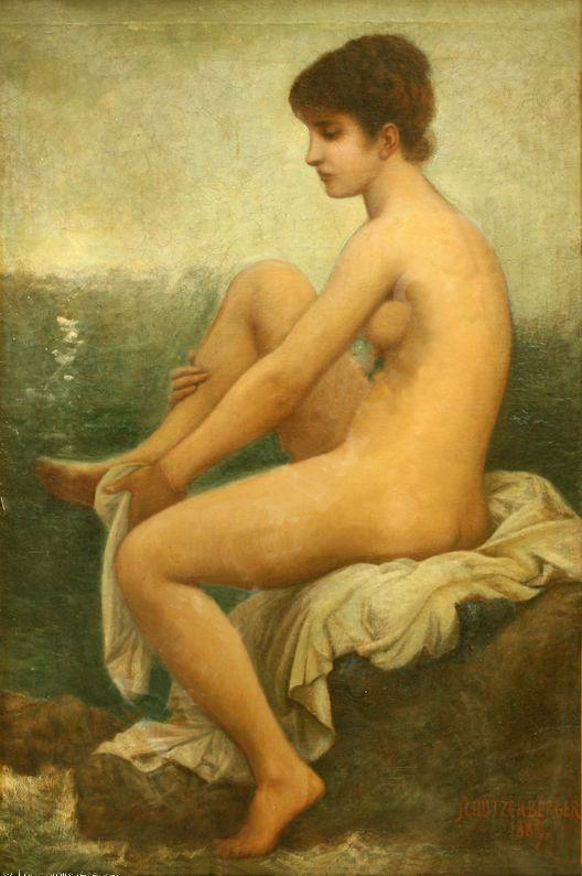 Baigneuse